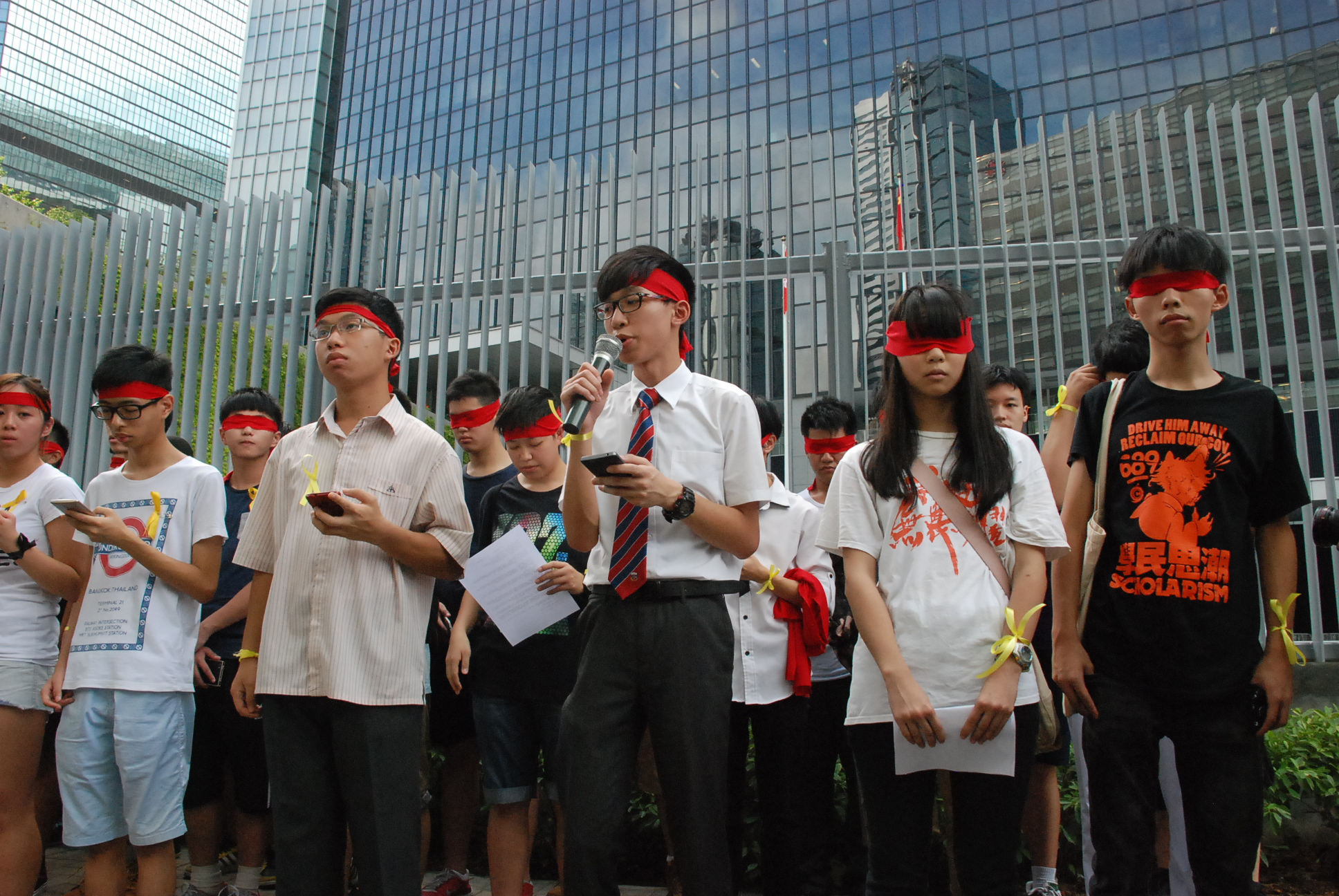 約30名學民思潮成員召開記者會，公佈中學生9月26日罷課一日，爭取公民提名普選特首